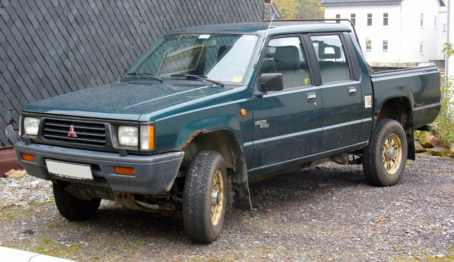 Mitsubishi L200 4WD